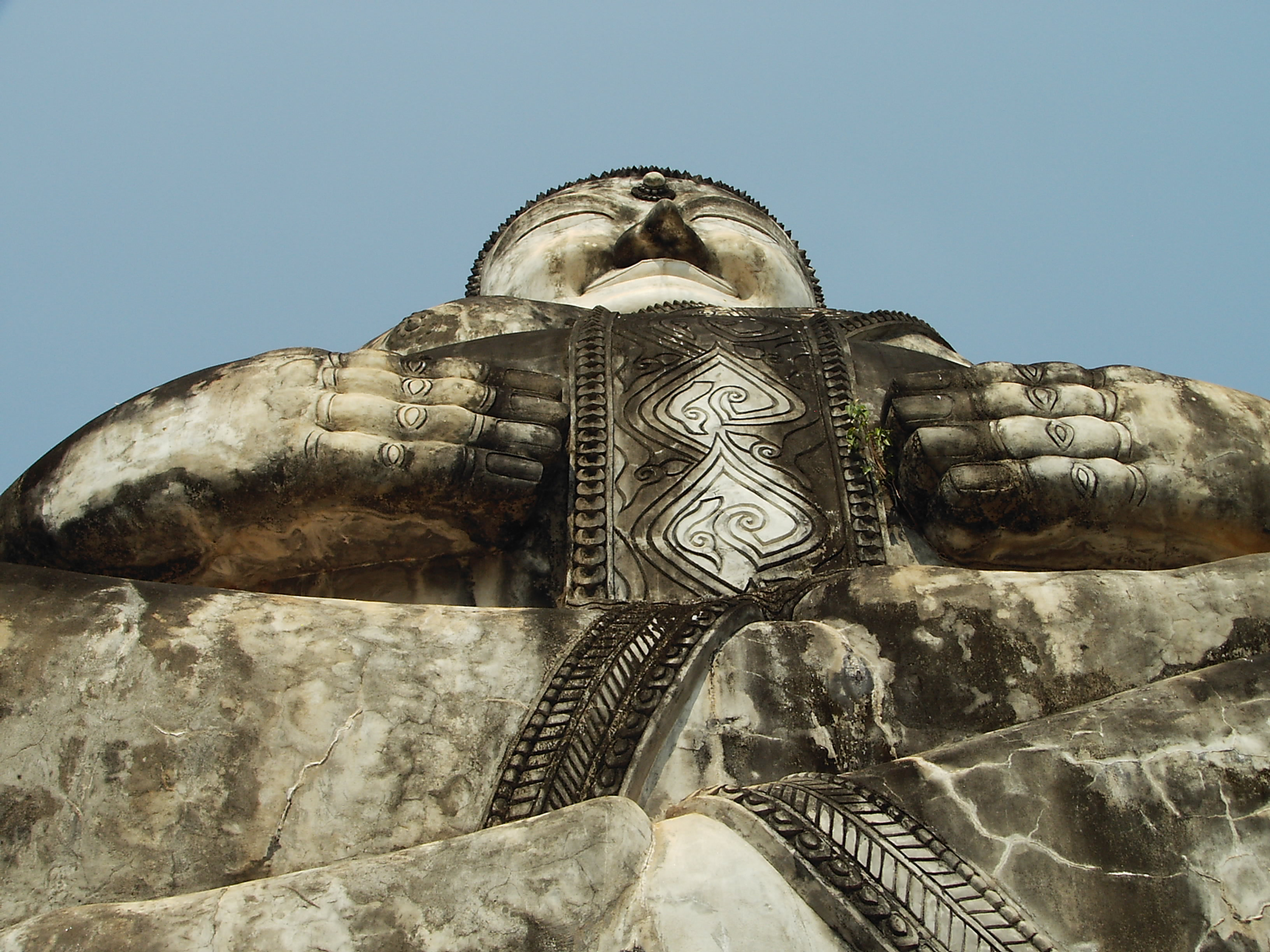 Sala Keoku Statue Park